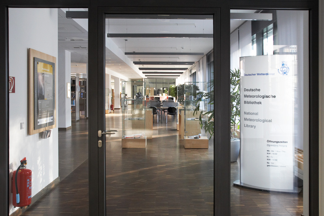 Eingangsbereich Deutsche Meteorologische Bibliothek